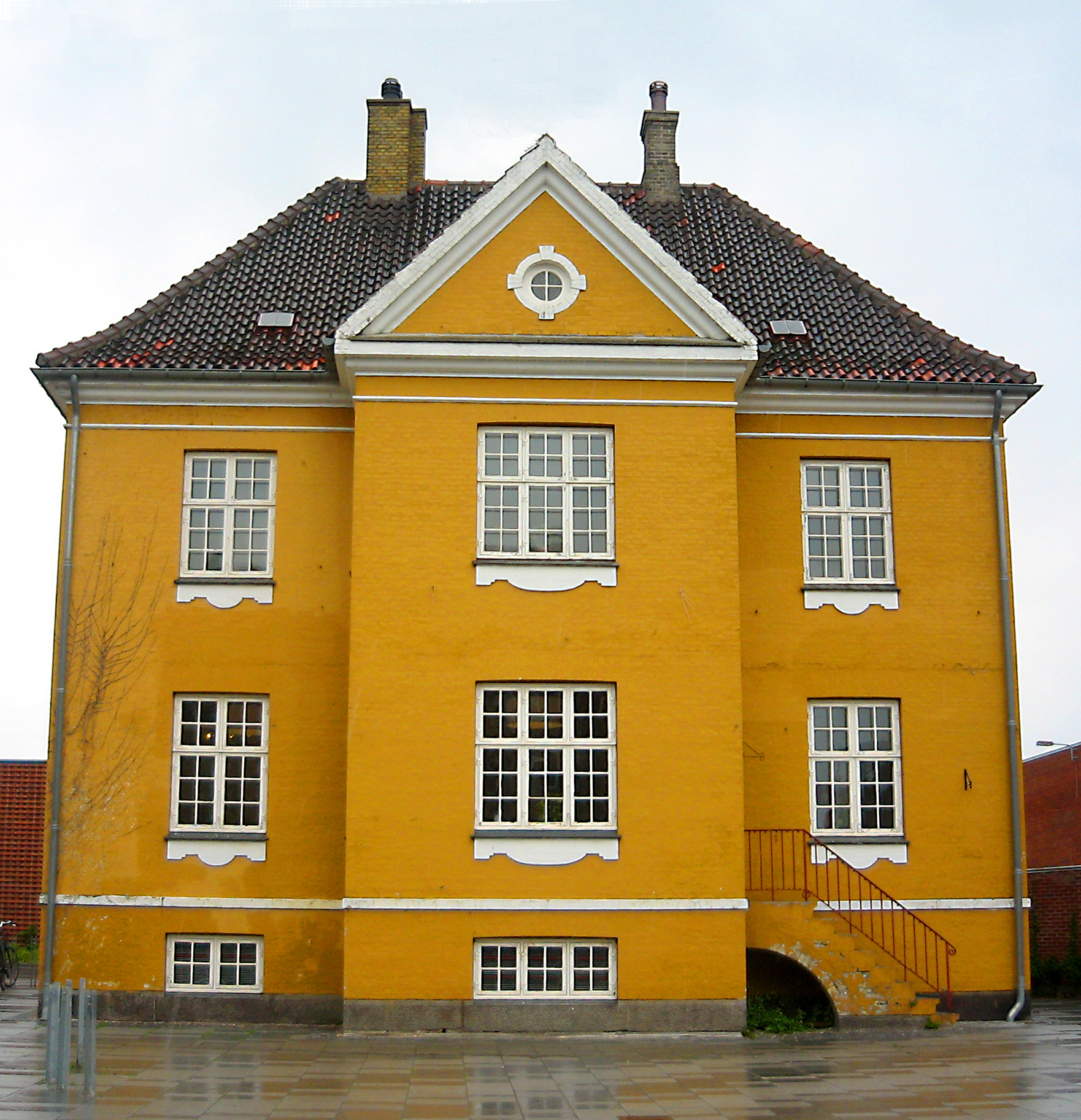 Den Gule Villa på Frederiksberg/Flintholm/Revykvarteret, nu kvarterets kulturhus og fredet.